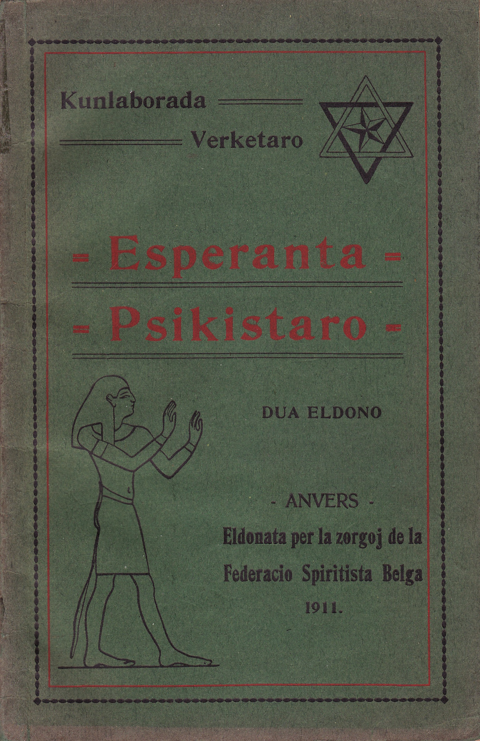 Esperanta Psikistaro